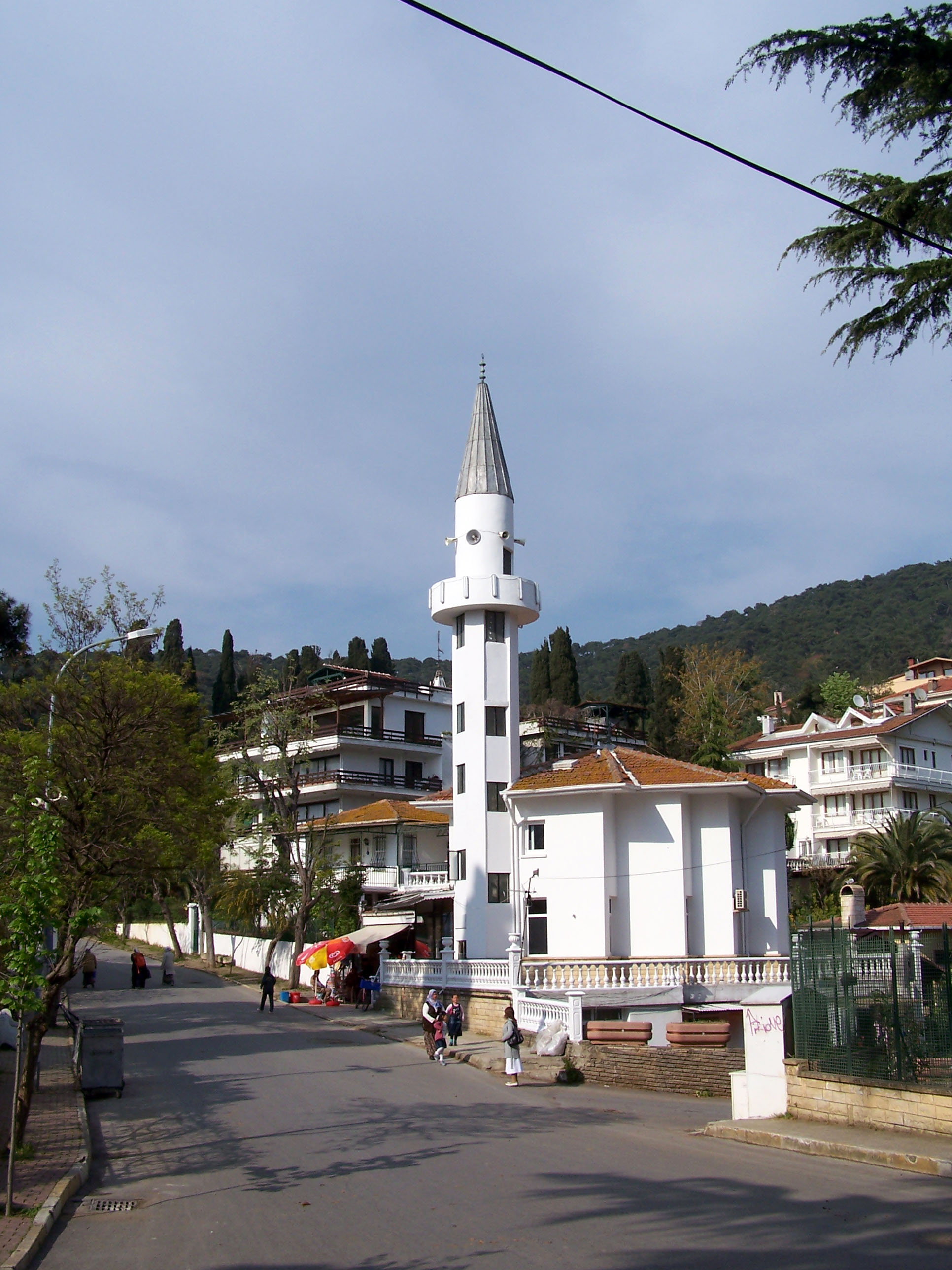 Mosque in Büyükada, Turkey